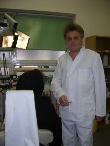 Miroslav Donfrid, doktor nauka, stomatolog iz Belog Manastira